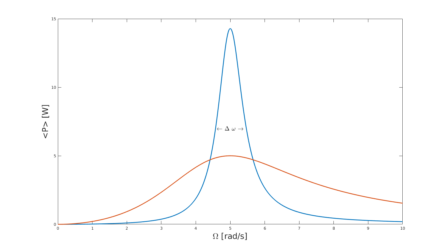 Potencia de un oscilador eléctrico con distinto ancho de banda y factor de calidad